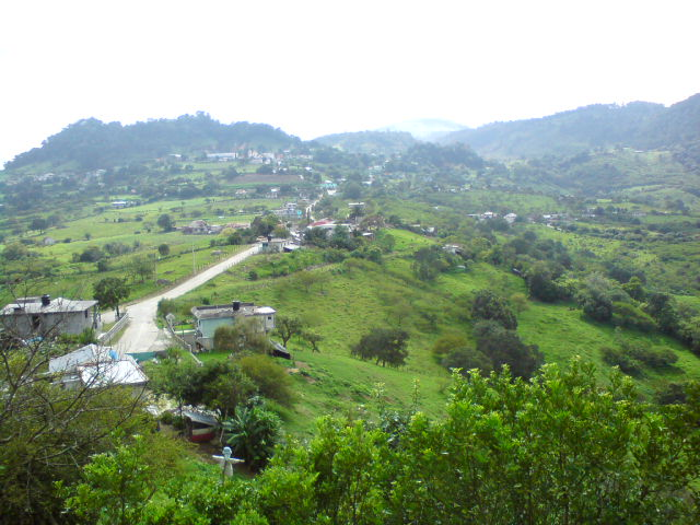 panoramica Juarez